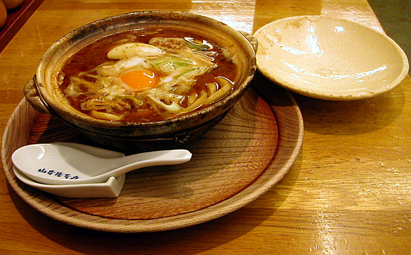 撮影者：小太刀 山本屋の味噌煮込みうどん 味噌煮込みうどん用の土鍋の蓋は食事中にうどんや汁を入れる小皿の代わりに使うため、空気孔がついていません。